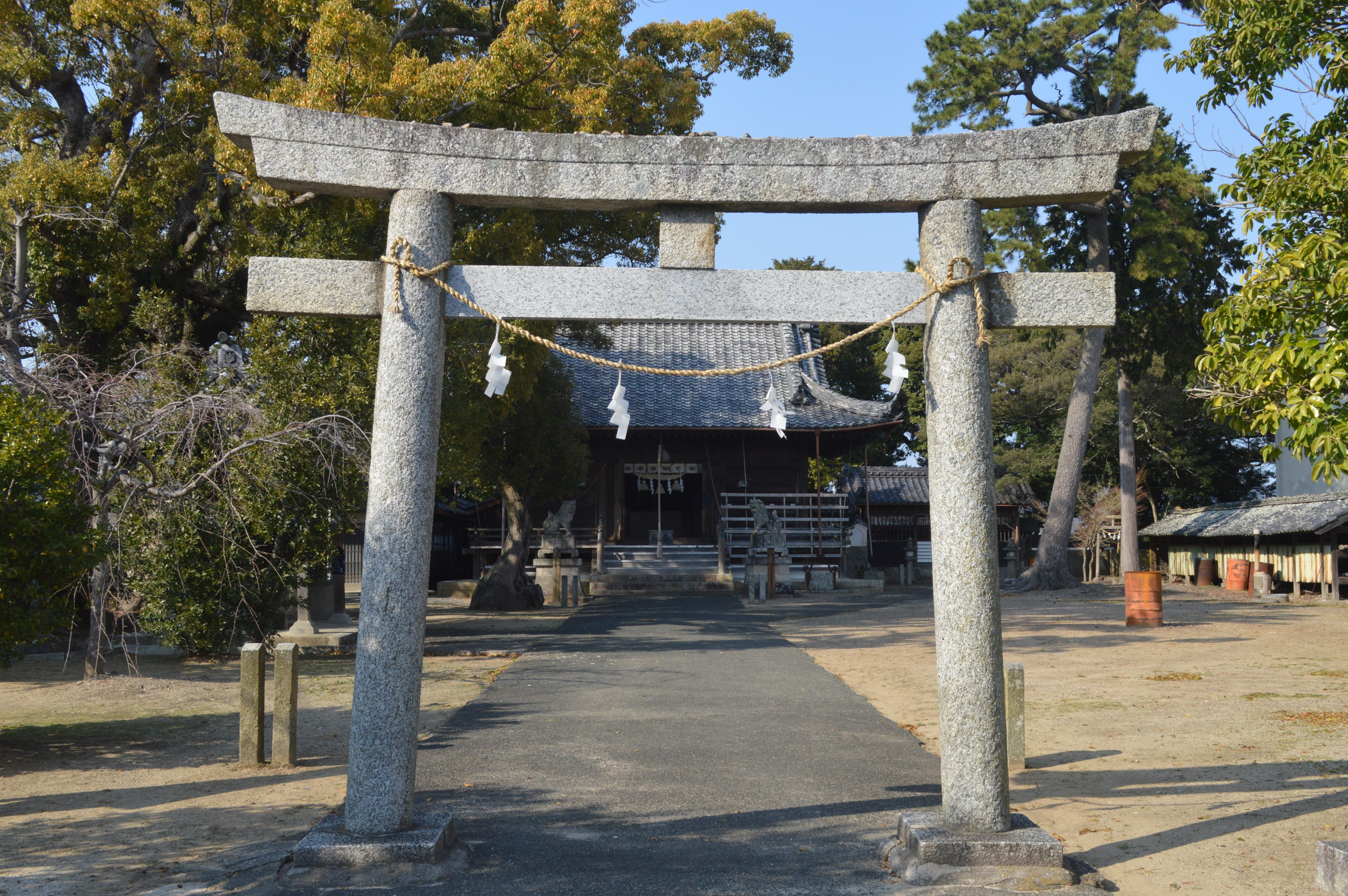 愛知県蒲郡市形原町御嶽44にある御嶽神社。